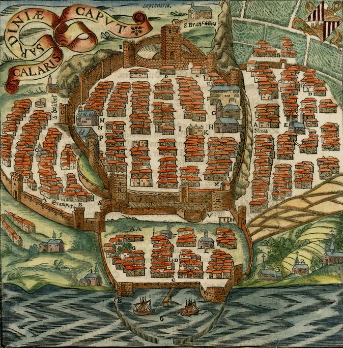 Mappa di Cagliari di Sigismondo Arquer dalla Cosmographia di Sebastian Munster - 1550